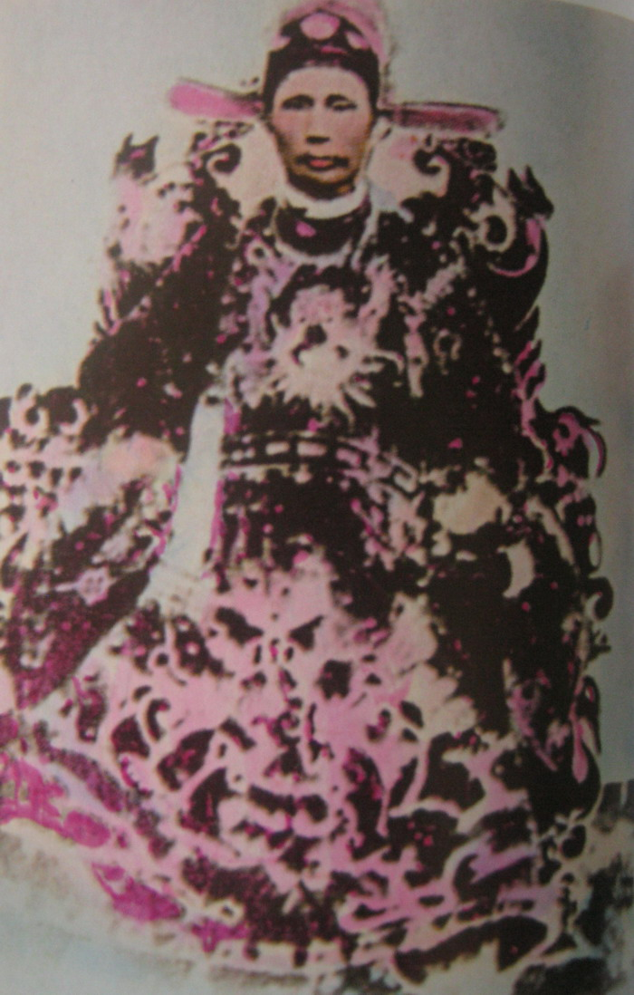 Chân dung Phạm Phú Thứ (1821-1882).